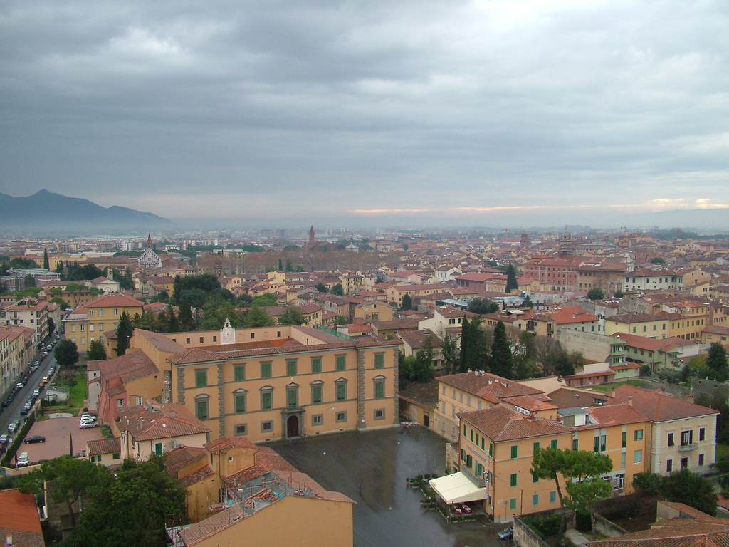 Pisa, Toscana, ItaliaCloudy Pisa Skyline